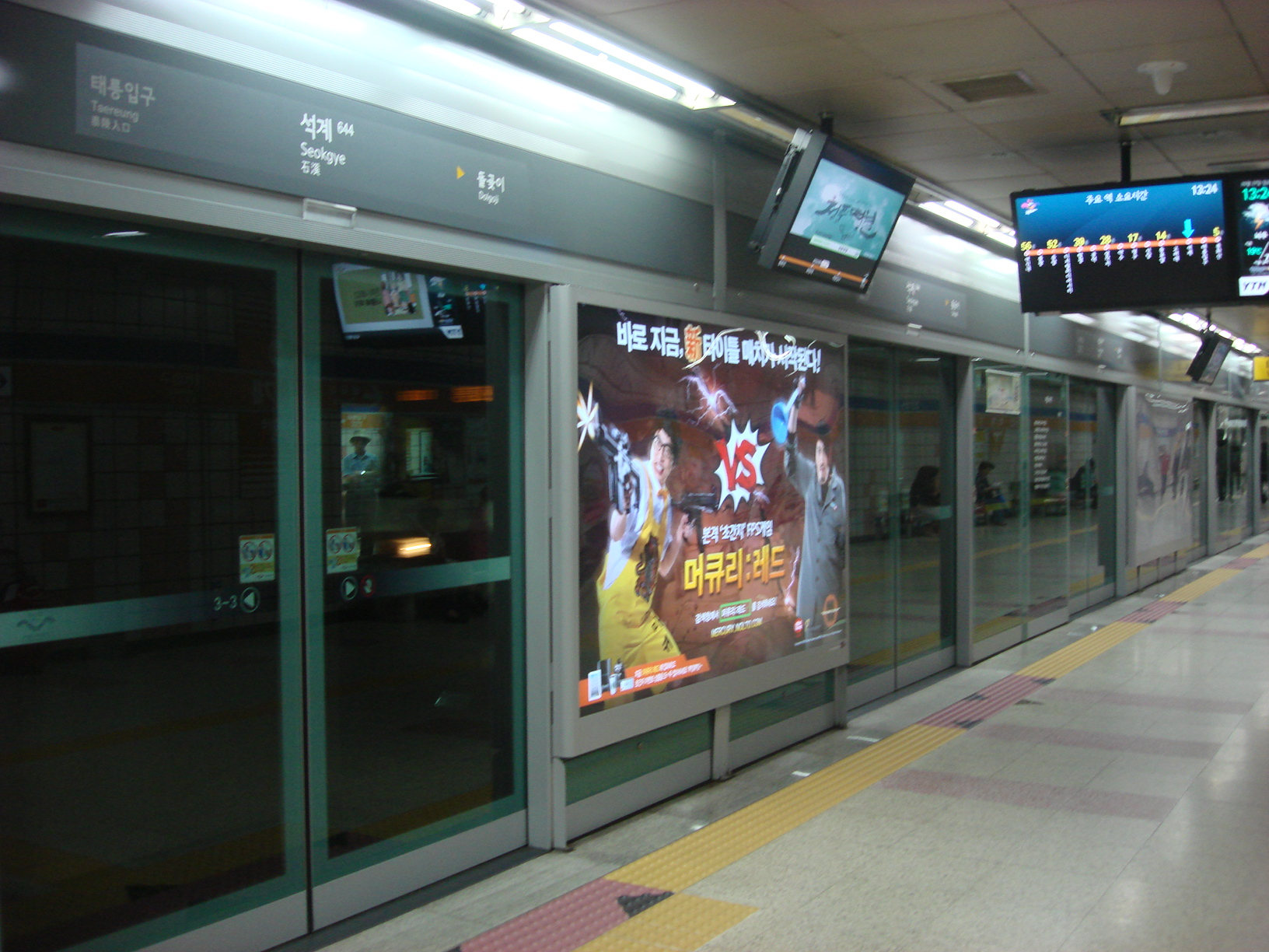 6호선 석계역 승강장